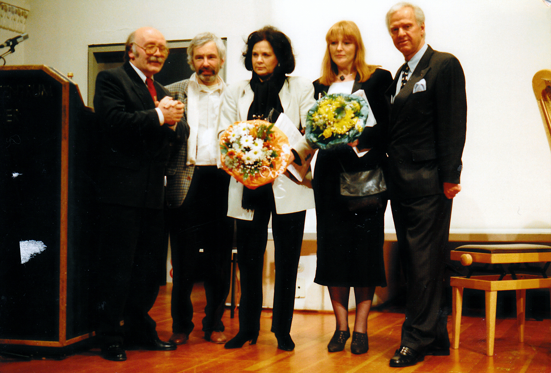 Nach der Verleihung des ersten Stadtkultur-Preises überhaupt durch den Freundeskreis Hannover am Abend des 2. März 1995 im Beethovensaal der Stadthalle (von links): Erwin Schütterle, Geschäftsführer und Jury-Vorsitzender des Freundeskreises Hannover; Jot Claus, ausstellender Künstler; Dagmar Brand, Initiatorin des preisgekrönten Projektes "Winter - Gärten, Skulpturen in der Güntherstraße"; Ute Blohm, Organisatorin der Winter - Gärten ...; Prof. Dr. Dr.-Ing. Dr. h.c. Klaus E. Goehrmann, seinerzeit 1. Vorsitzender des Freundeskreises Hannover e.V. ...